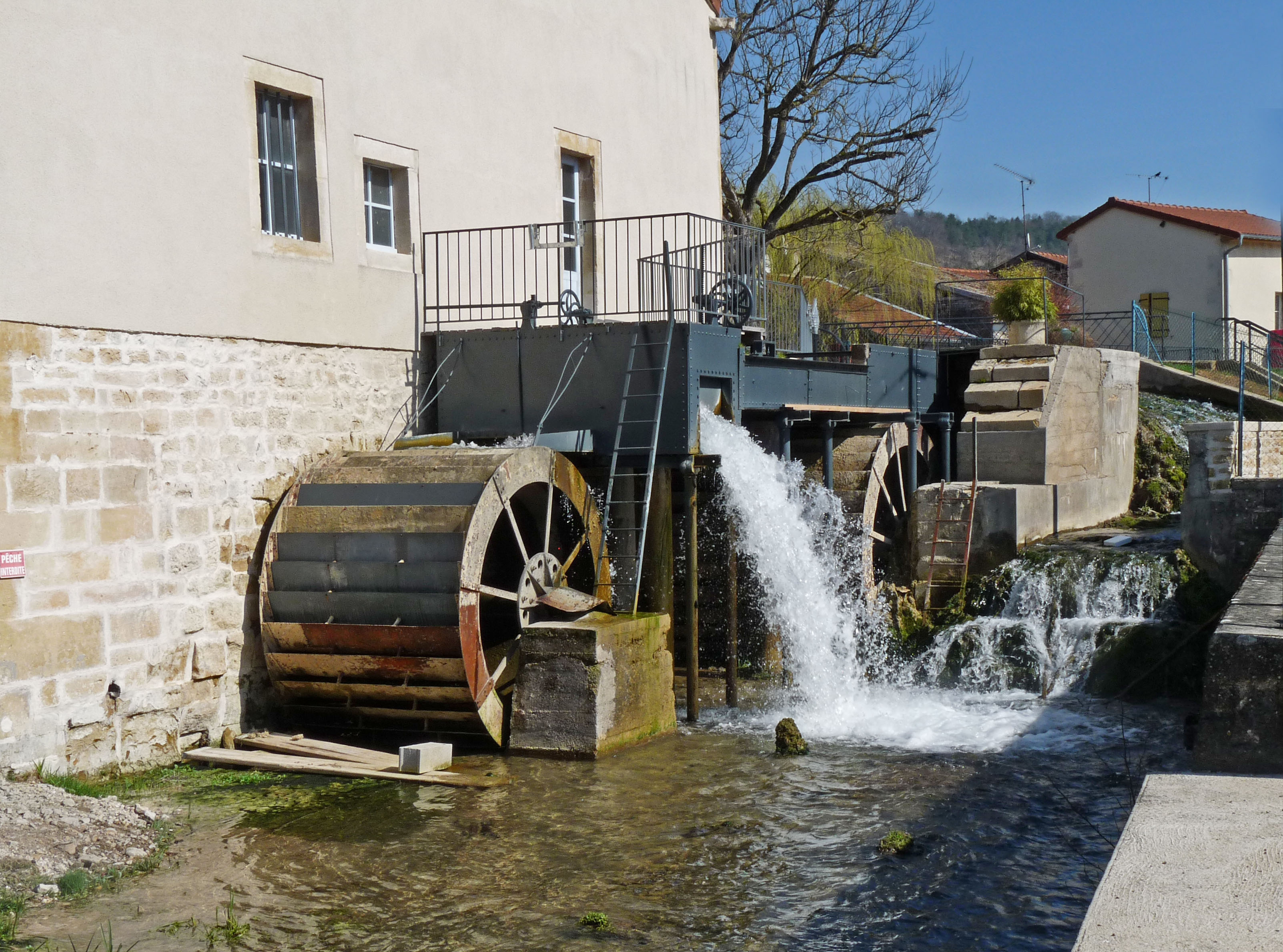 Poissons (Haute-Marne). Roue à aube du moulin, en activité du début du 19e siècle au milieu du 20e siècle.